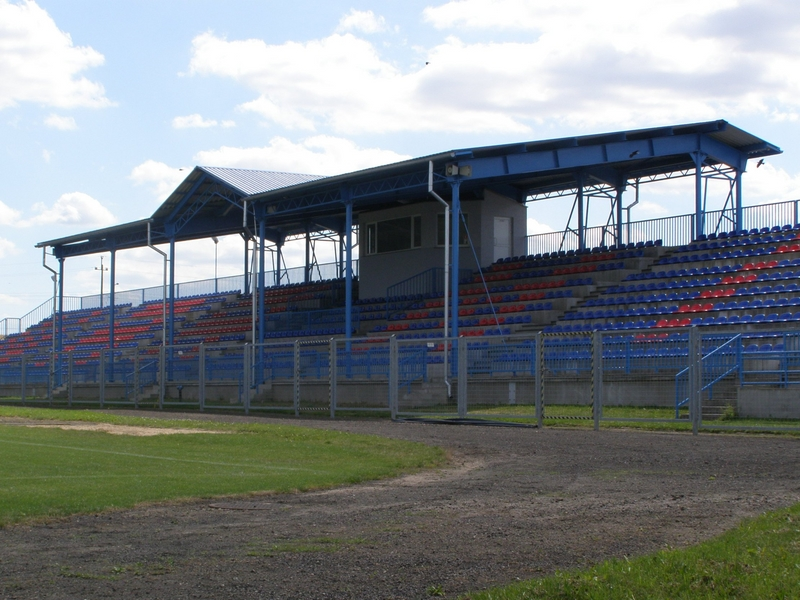 Grajewo - trybuny stadionu miejskiego im. Witolda Terleckiego przy ul. Piłsudskiego